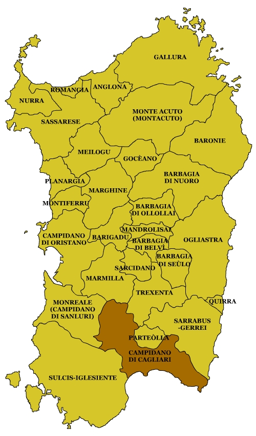 Sardinian Subregions